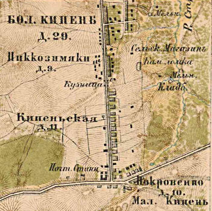 Деревня Кипень на карте 1885 года.